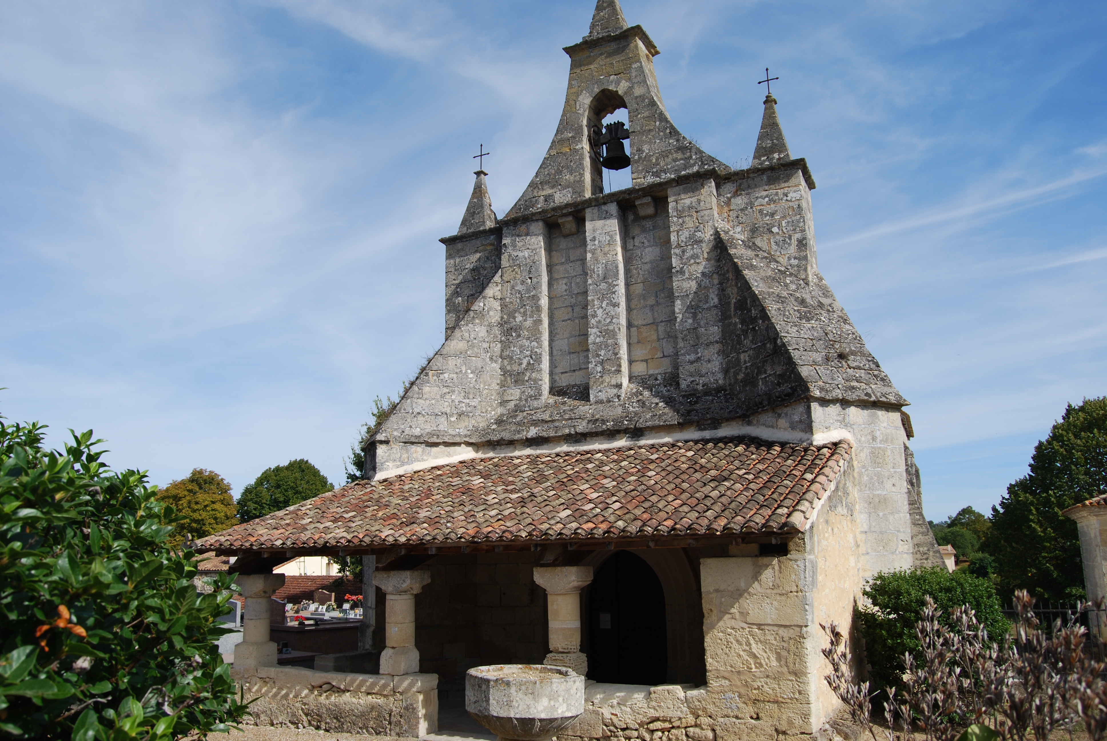 Église de Tizac-de-Curton, (Inscrit, 1925) .